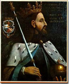 Stjepan Tomaš Kotromanić, king of Bosnia